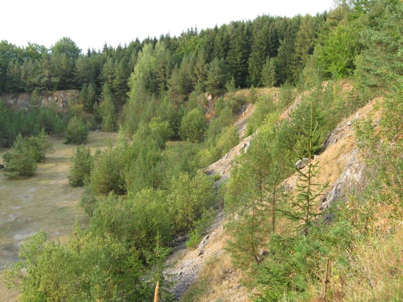 Bývalý lom Velká dohoda